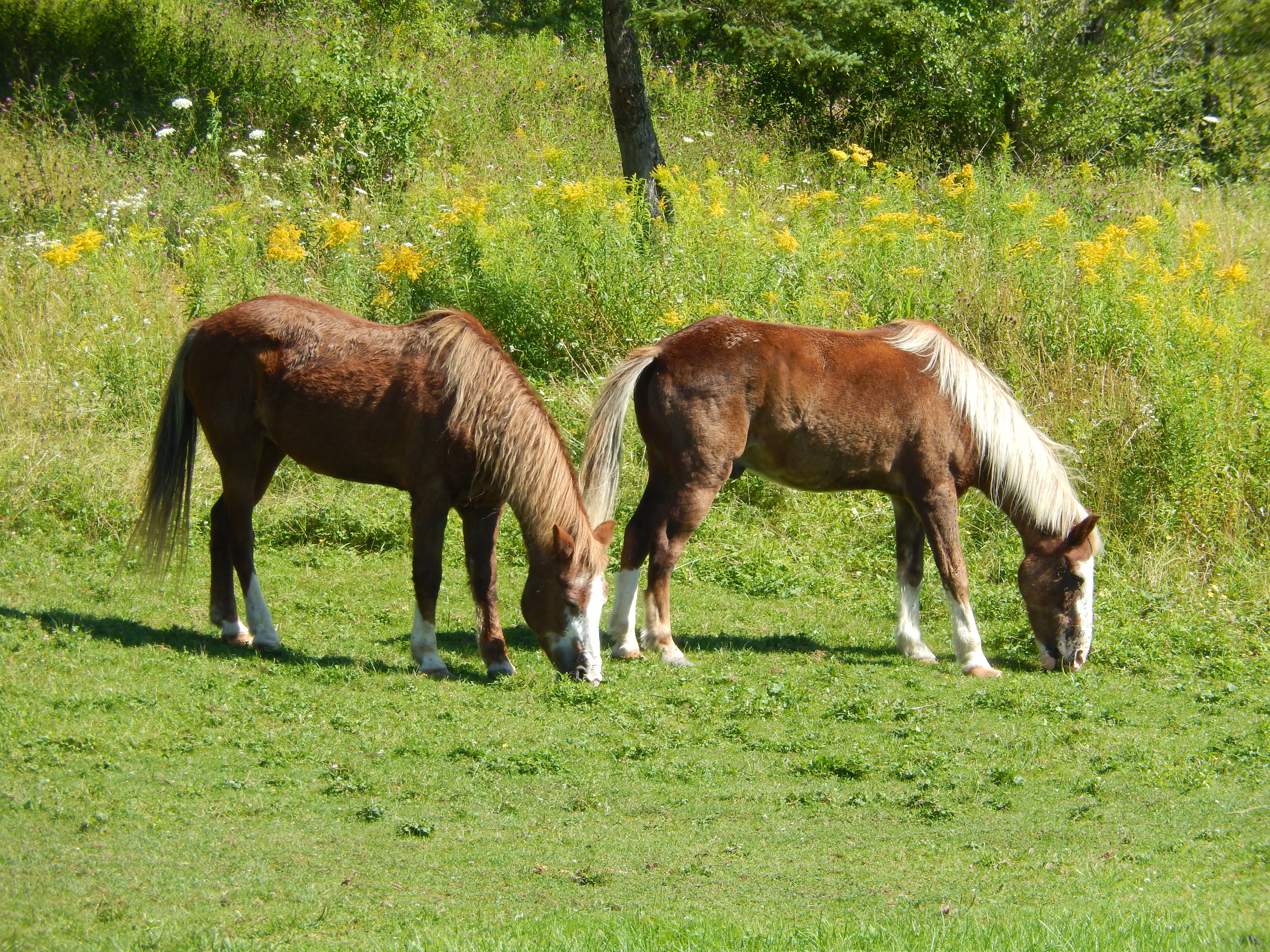 Chevaux de l'île de sable dans le parc faunique Shubenacadie.